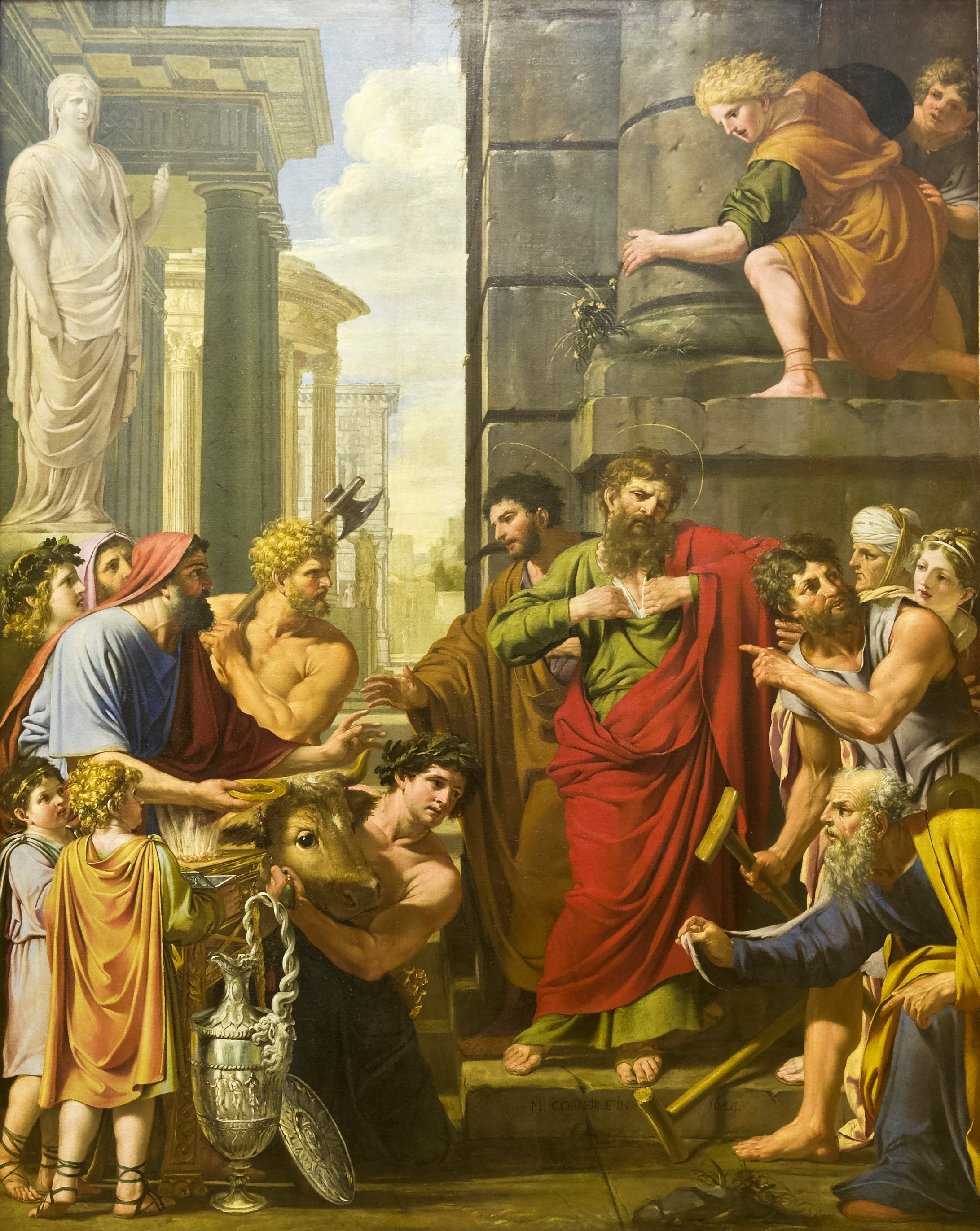 Michel Corneille l'ancien, Saint Paul et saint Barnabé à Lystres, 1644, Arras, musée des Beaux-Arts